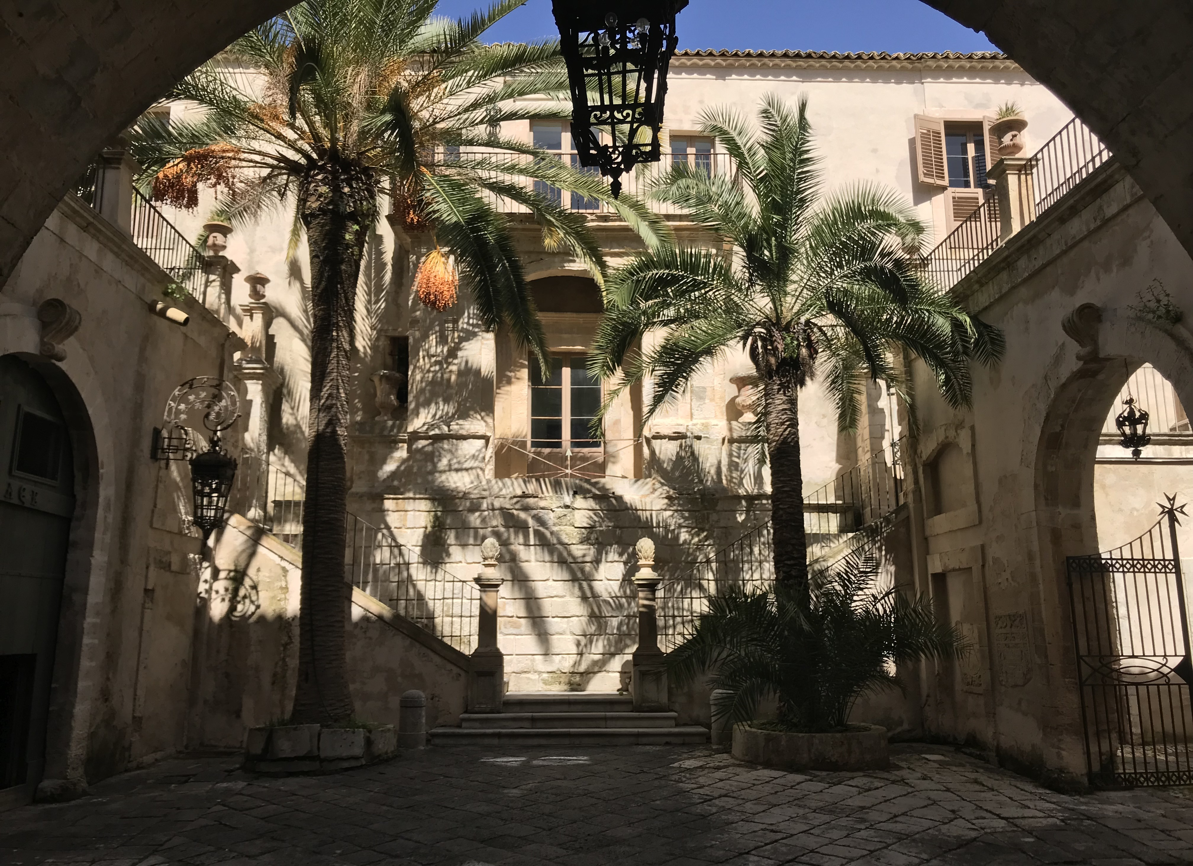 Cour intérieure du Palais